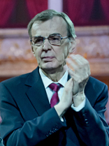 Georgi Taratorkin